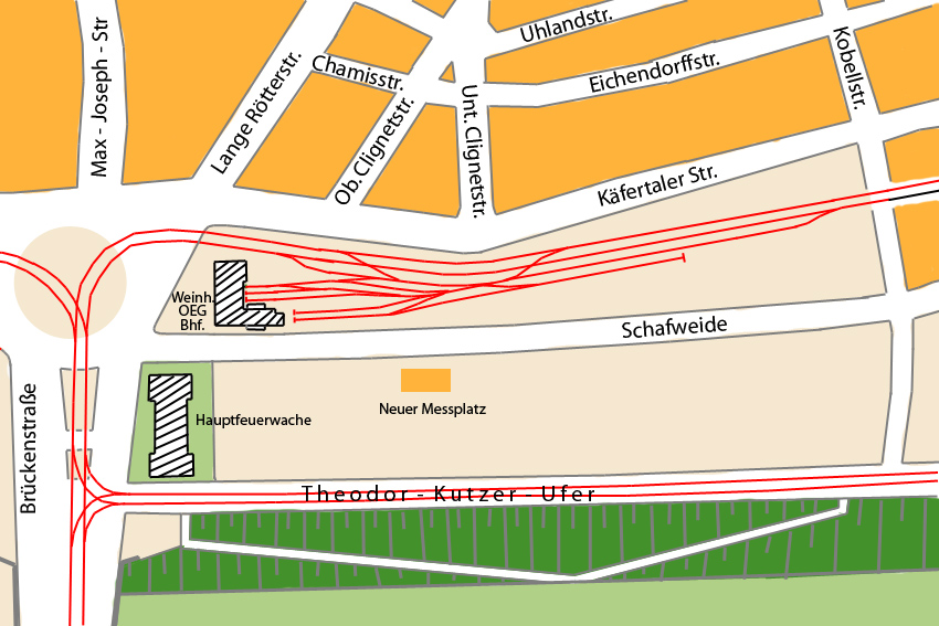 Lageplan des OEG Bahnhofs Weinheim am alten Messplatz